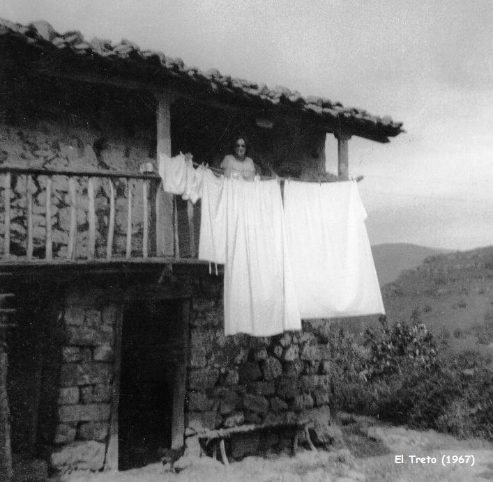 Maison ancienne en pierres. Région montagneuse de Cantabrie. Ouvertures uniquement sur la façade avec balcon. Aujourd'hui détruite, comme beaucoup d'habitations de de ce type. Cliché familial (1967) 6cmx6cm. Catégorie:Architecture Catégorie:Cantabrie